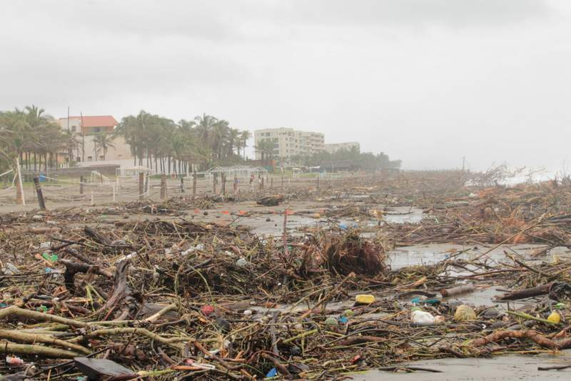 Estragos causados por el Huracán Ingrid y tormenta Manuel. En la zona "diamante" (Acapulco, Guerrero).